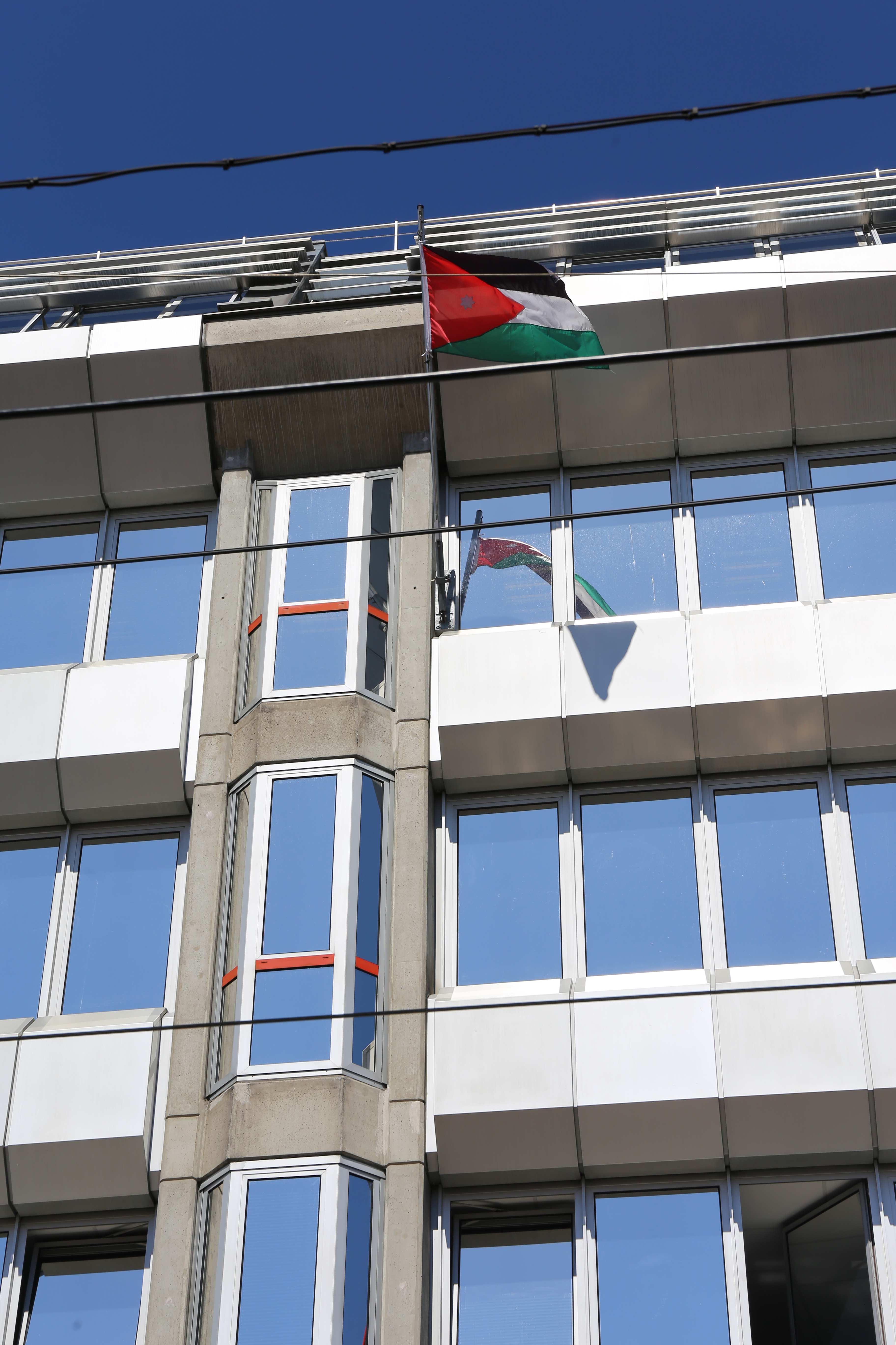 Ambassade de Jordanie à Vienne.